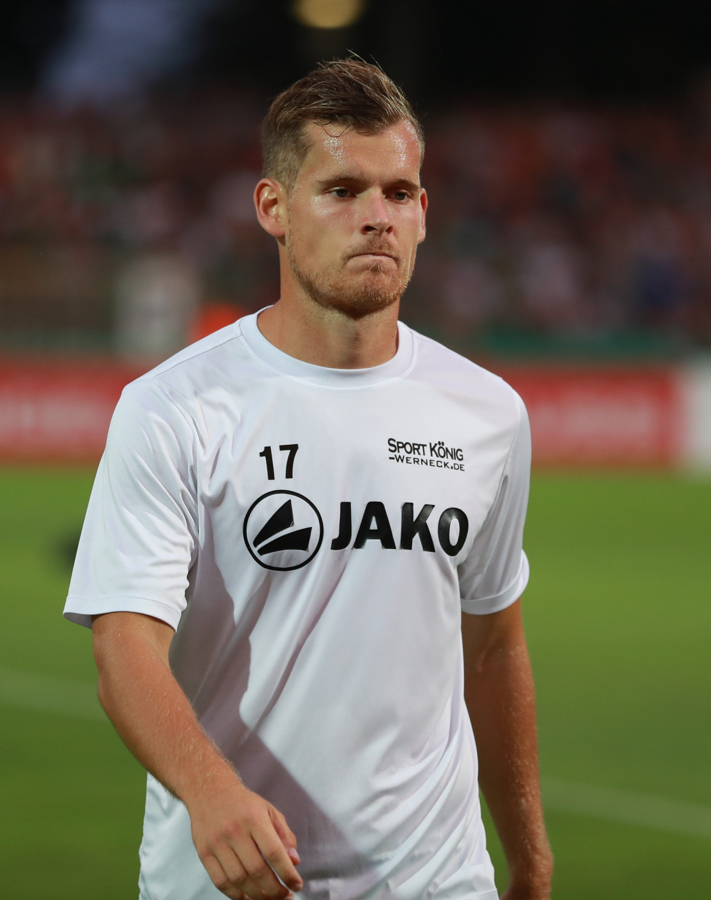 DFB-Pokal 2018/19, 1. Hauptrunde: 1. FC Schweinfurt 05 gegen FC Schalke 04 0:2 (0:1)